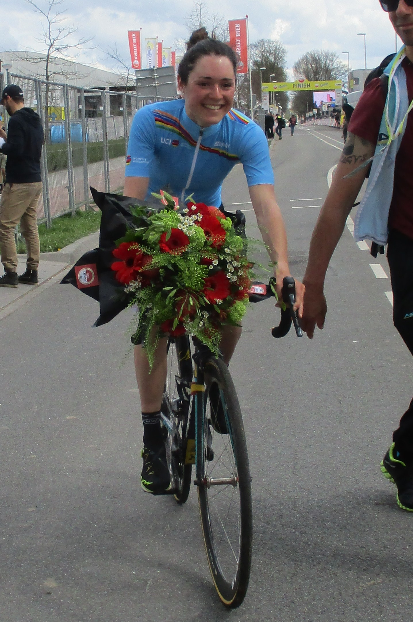 Finish van de Amstel Gold Race Ladies Edition 2018 in Berg, Valkenburg aan de Geul.